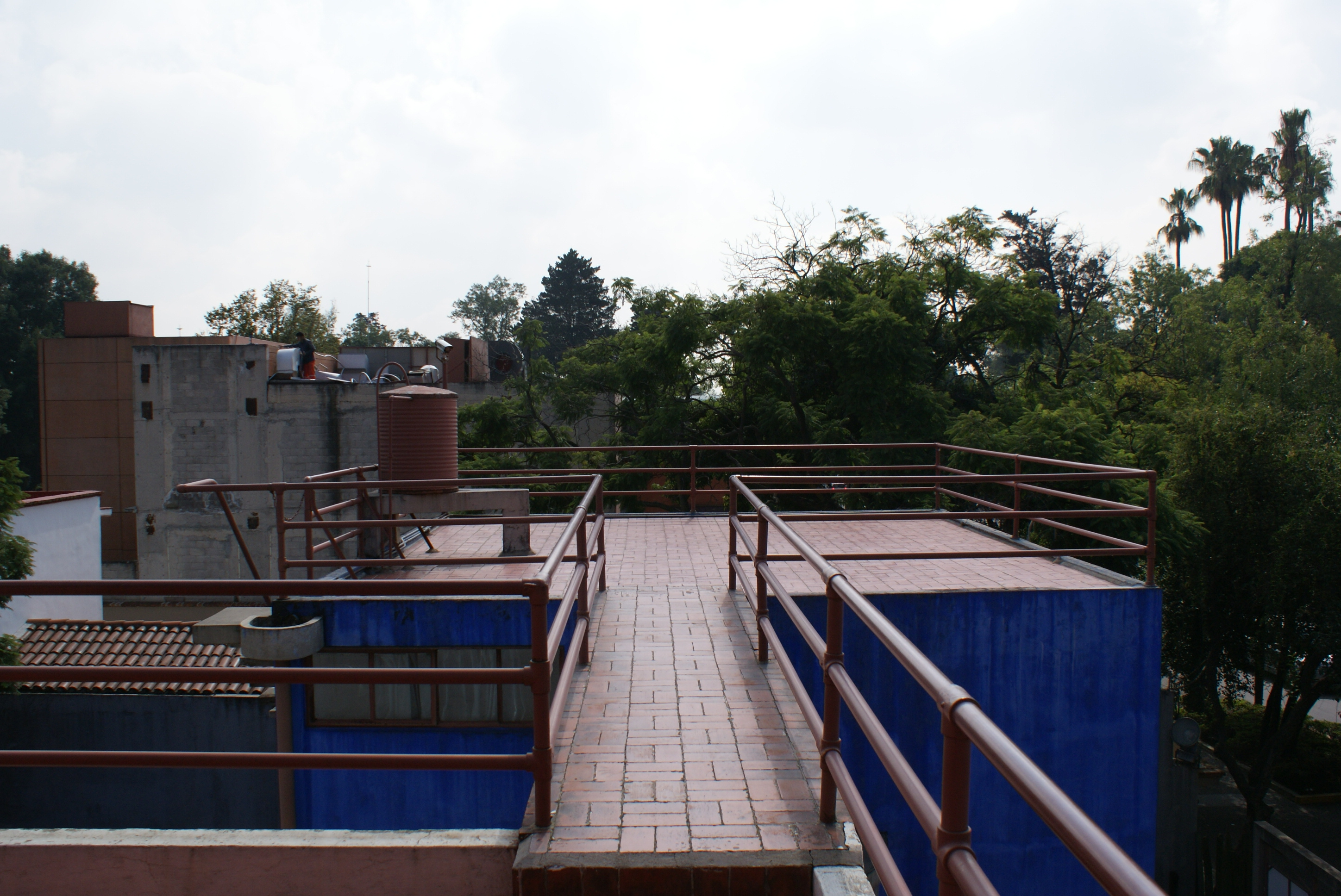 En el Museo Casa Estudio Diego Rivera y Frida Kahlo las casas de Diego y Frida están unidas por un puente en las azoteas.